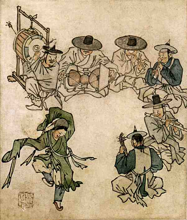 무동(舞童), 단원풍속도첩(檀園風俗畵帖)에서 종이에담채, 27cm x 22.7cm, 국립 중앙박물관 소장